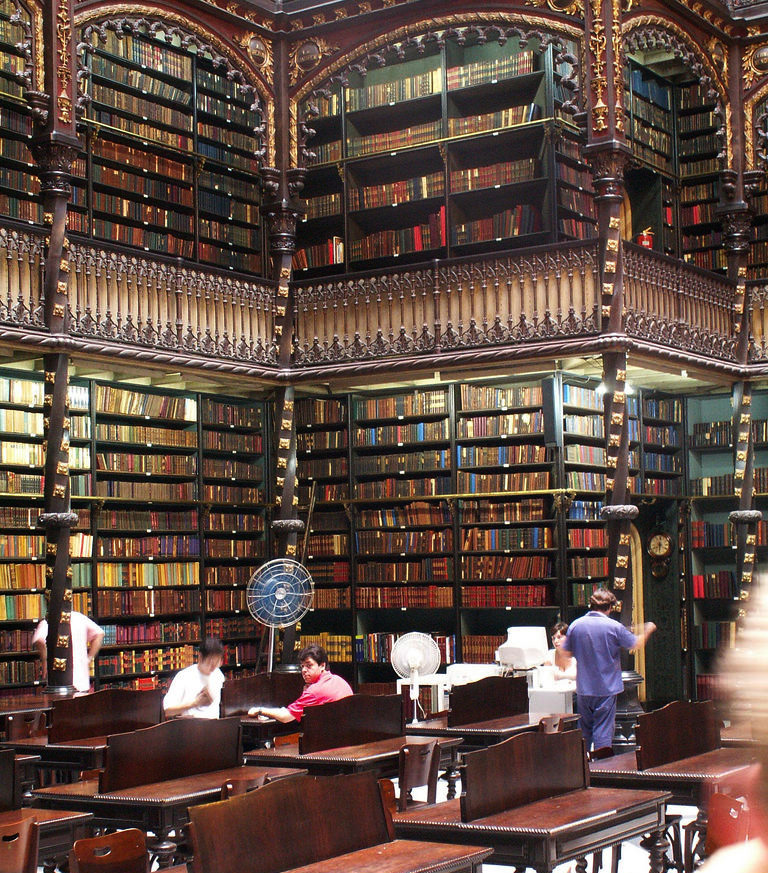 Interior of the Real Gabinete Português de Leitura in Rio de Janeiro, Brazil